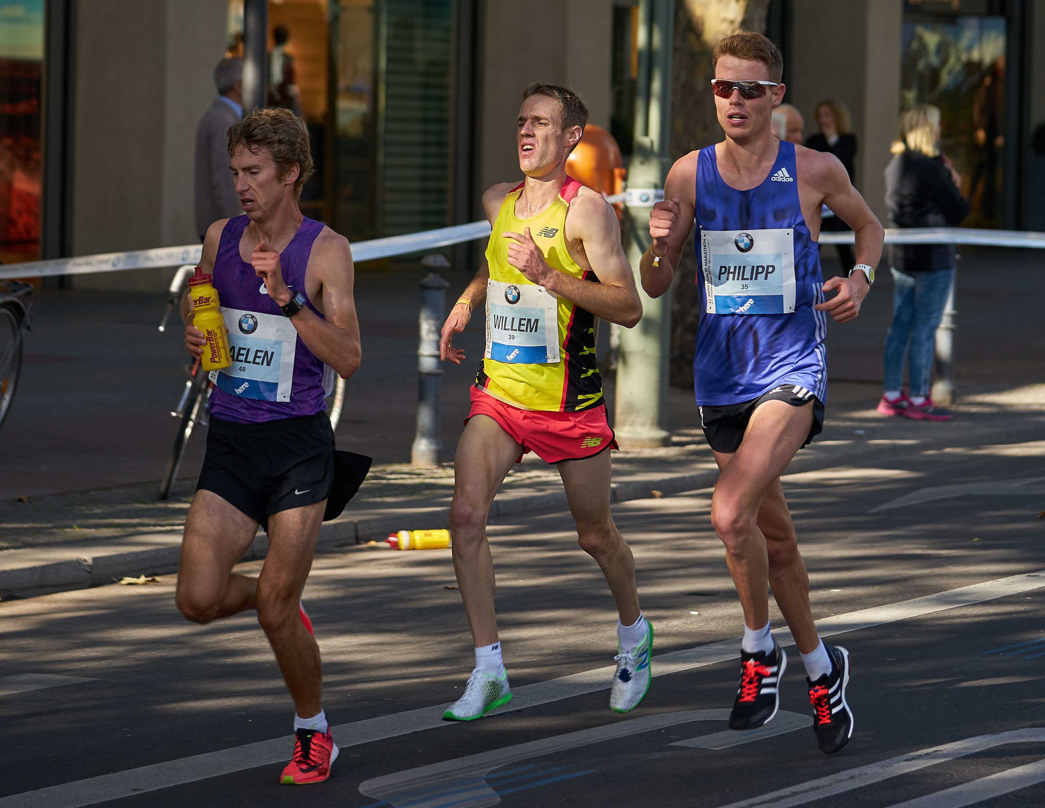 Berlin Marathon 2015 Caelen, Florent (BEL), van Schuerbeeck, Willem (BEL), Pflieger, Philipp (GER)